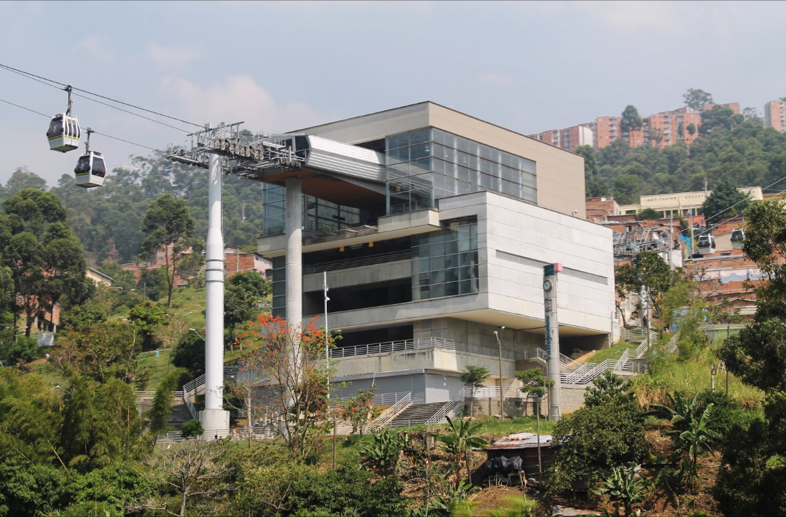 Estación Vallejuelos del Metro de Medellín